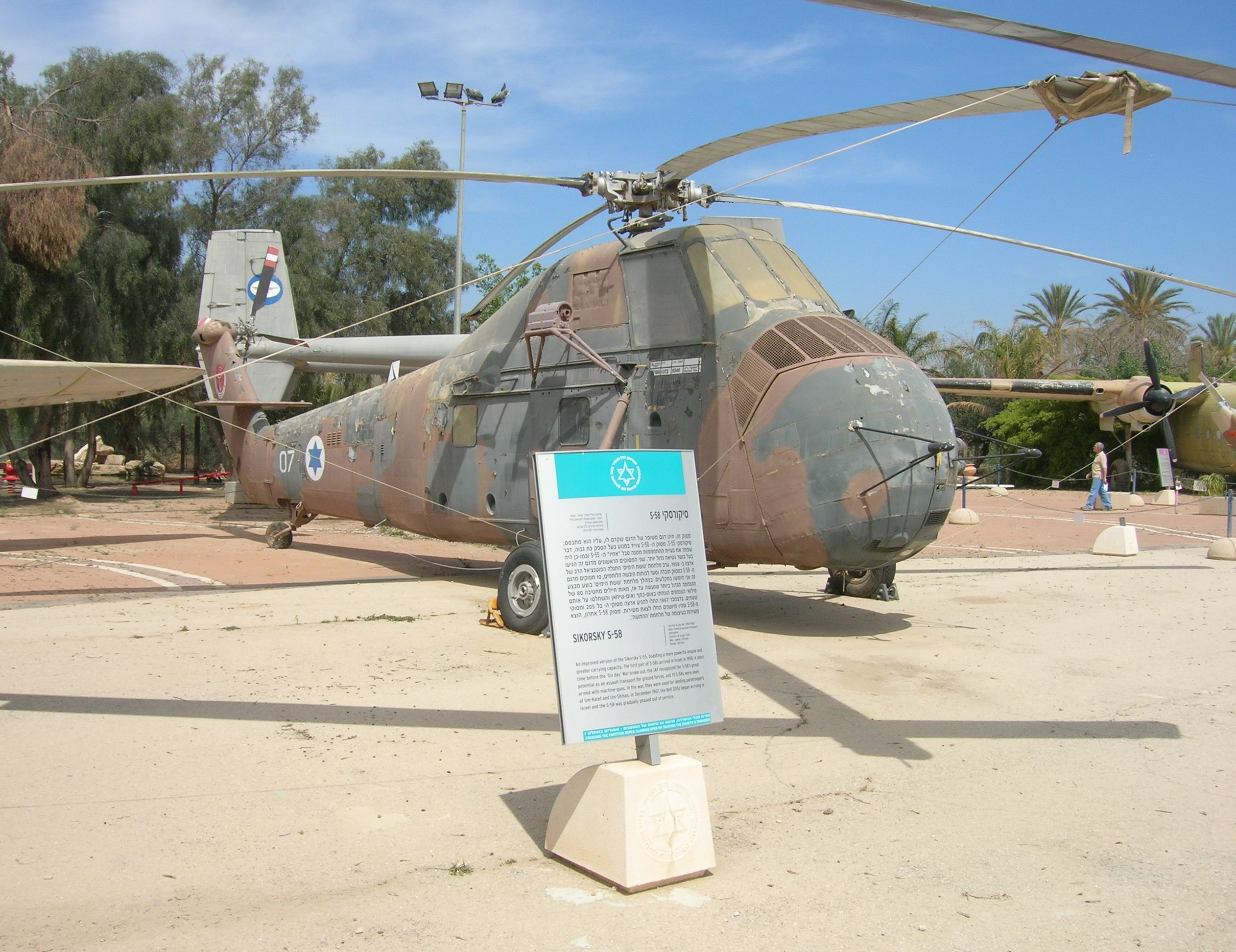 Sikorsky S-58 Helicopter